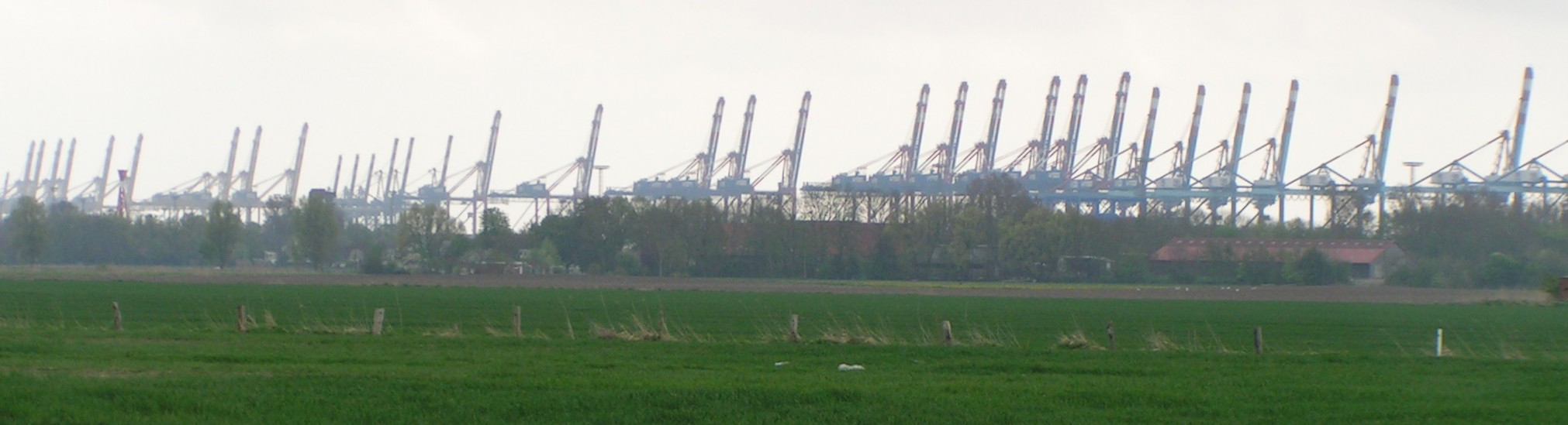 Krananlagen im Stadtbremischen Hafen Bremerhaven